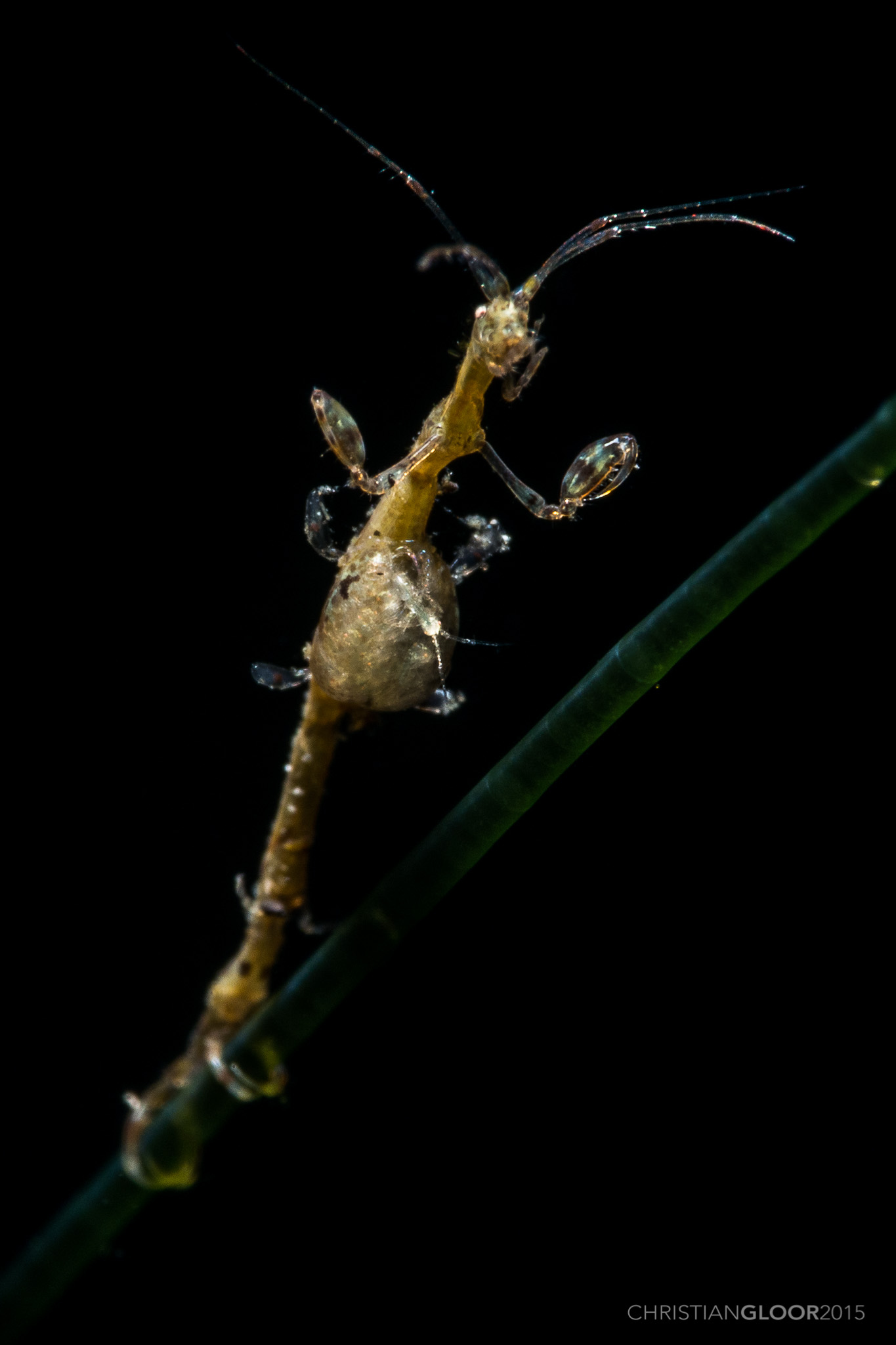 Skeleton shrimp / Caprellid sp.